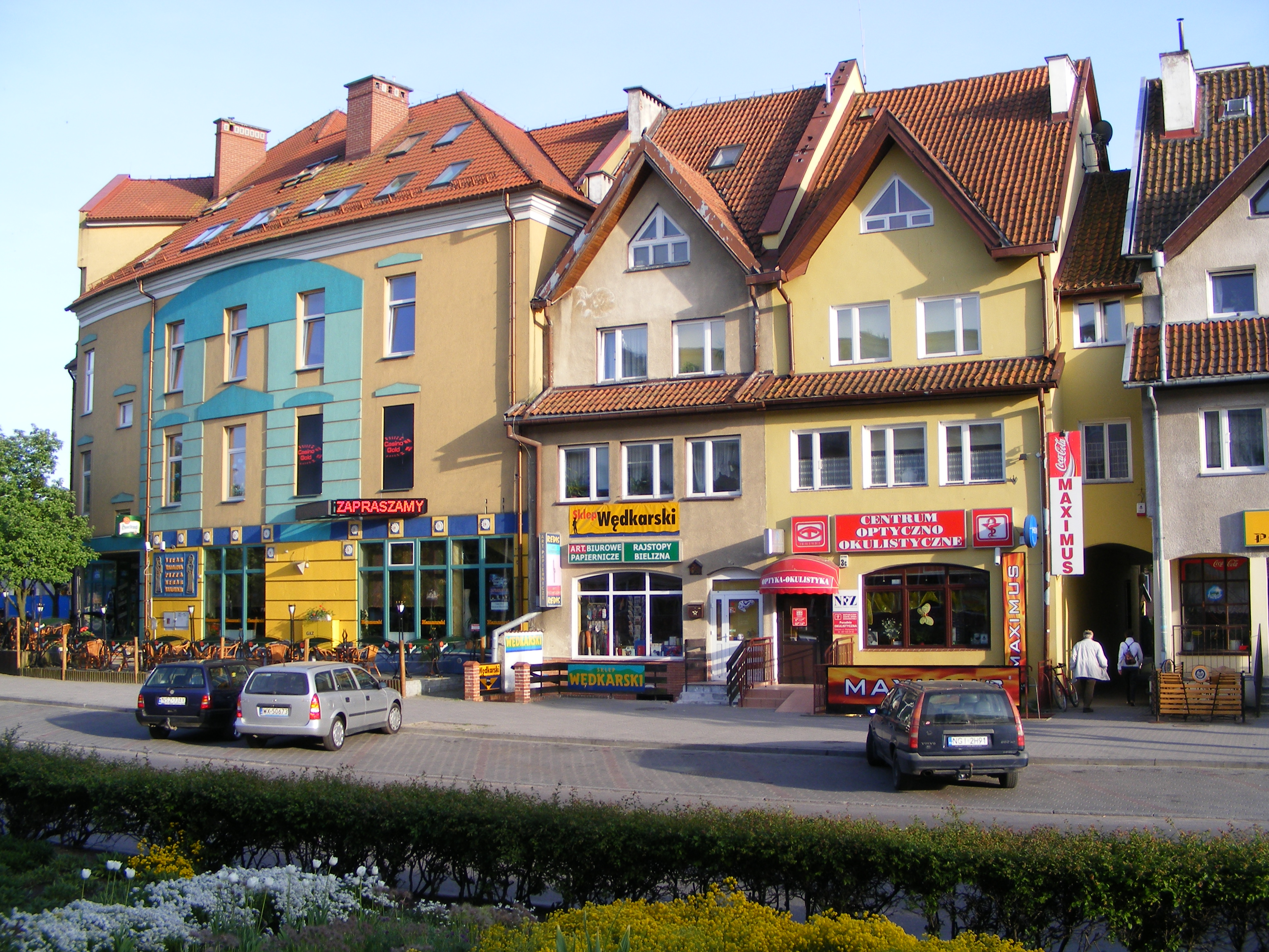 Obiekty handlowe w centrum miasta.